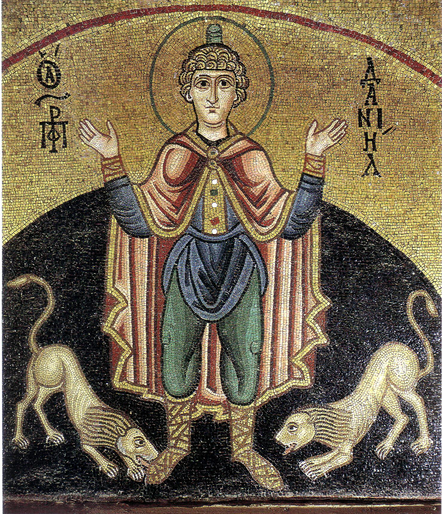 Hosios Loukas (diakonikon) - Daniel in the lions' den